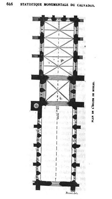 Mosles - plan de l'église par Arcisse de Caumont dans Statistique monumentale du Calvados, Volume 3, p.646